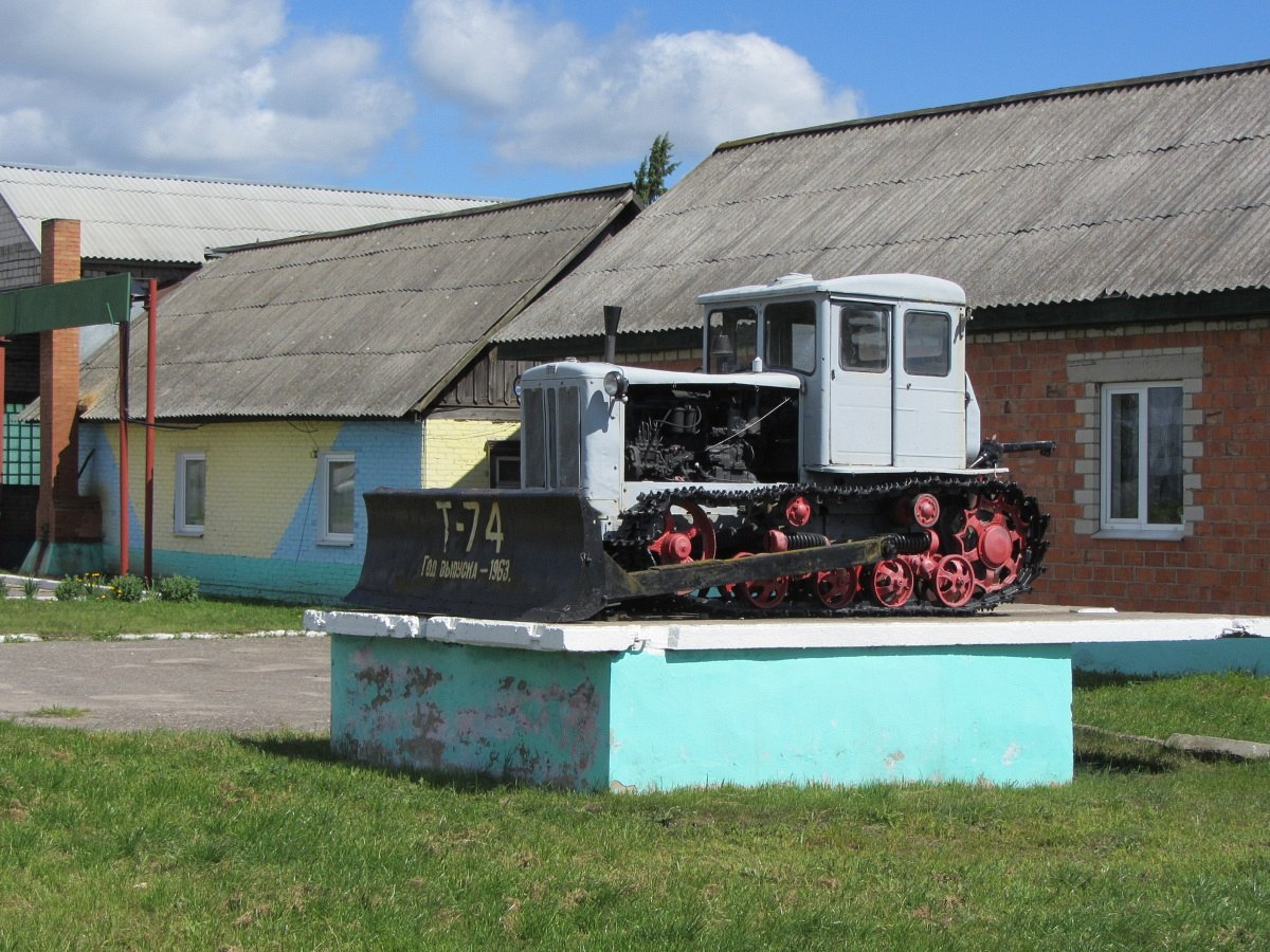 Жыткавічы. Помнік